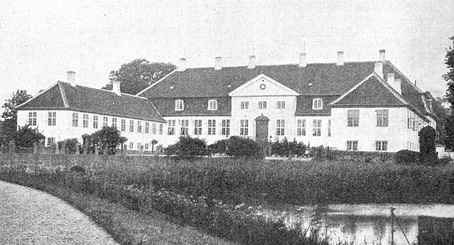 Hverringe er en gammel sædegård, som nævnes første gang i 1350. Gården ligger i Viby Sogn, Bjerge Herred, Kerteminde Kommune. Hovedbygningen er opført i 1790.